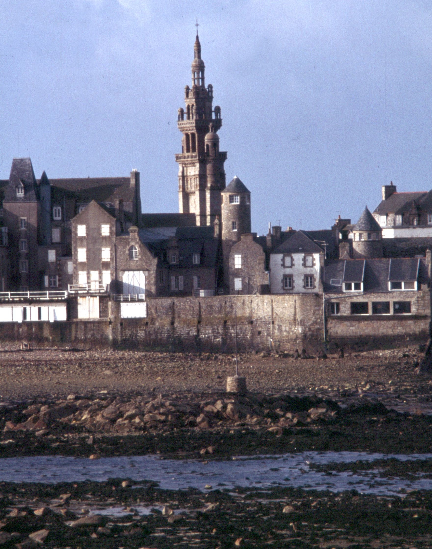 Roscoff, Notre-Dame de Croaz Batz 1978